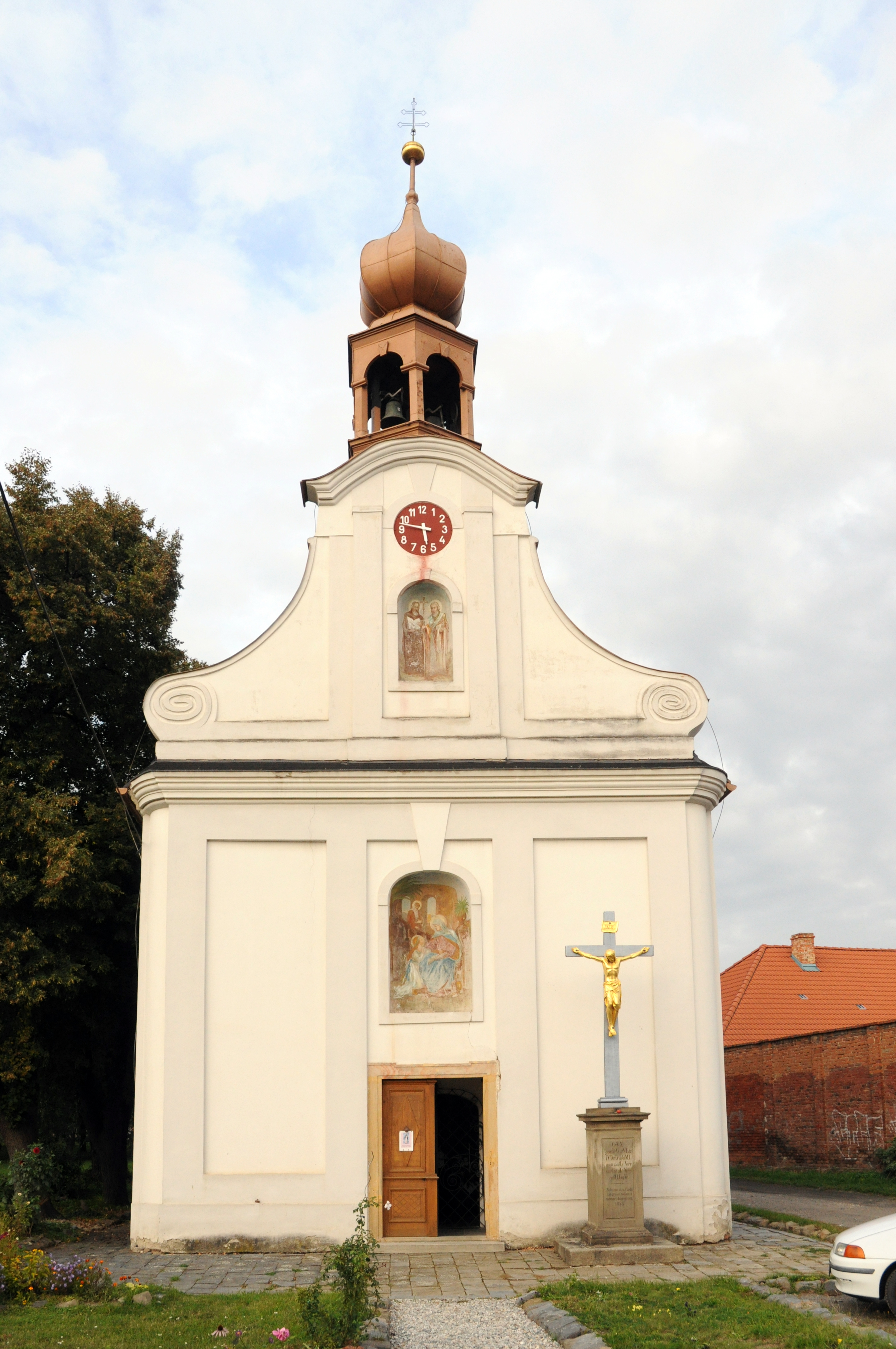 Kaple sv. Anny (Prostějov), Anenská, Prostějov